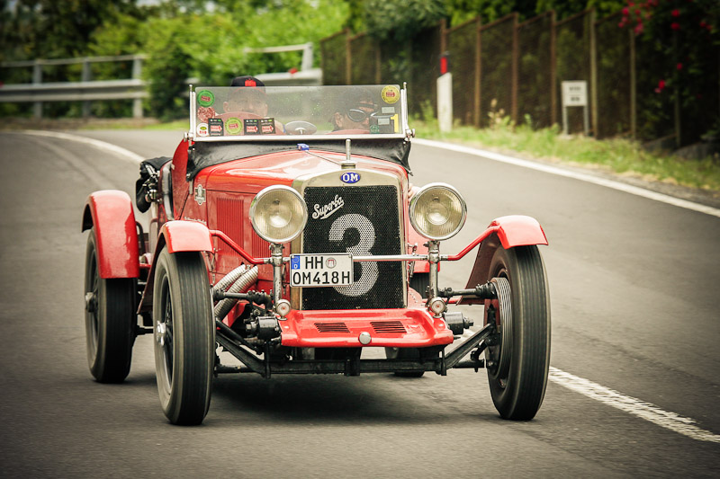 1000 miglia 2012 - SS della Futa . Pianoro (BO)